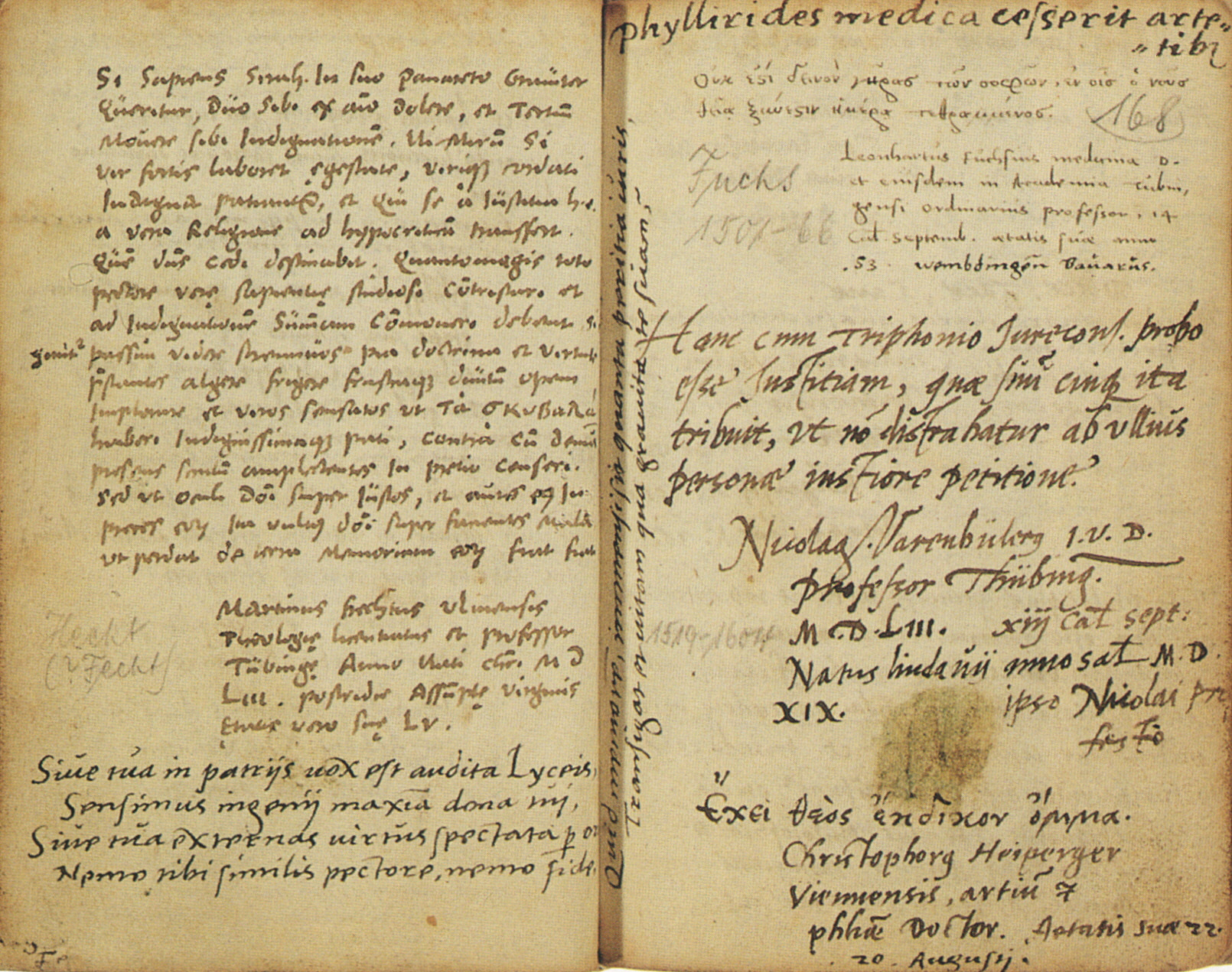 Doppelseite mit Eintragungen vom August 1553 aus dem Stammbuch des Johann Valentin Deyger, 1552–1554 Universitätsbibliothek Tübingen, Mh 1030